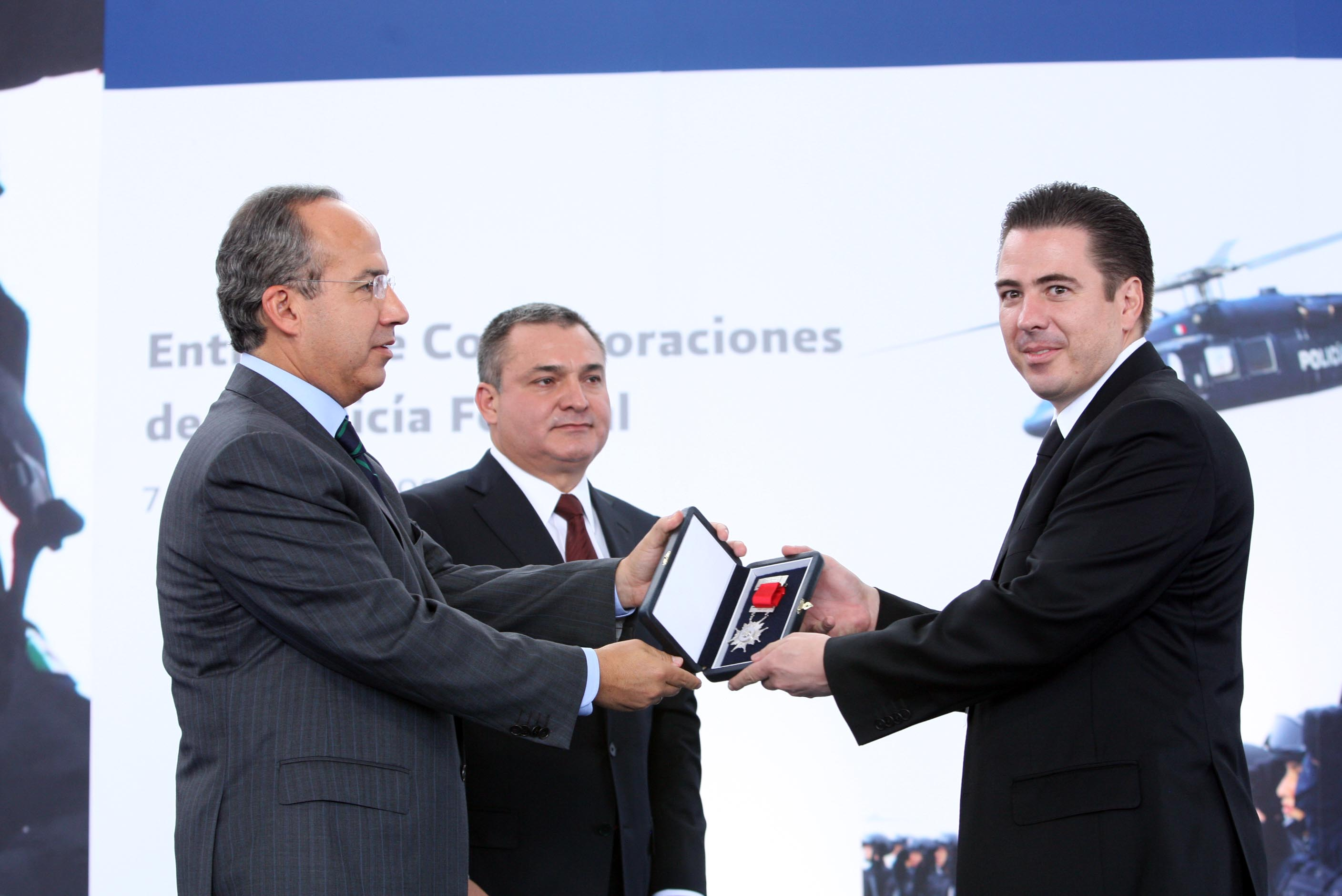 Luis Cárdenas Palomino recibe Medalla al Valor de manos del Presidente Felipe Calderón